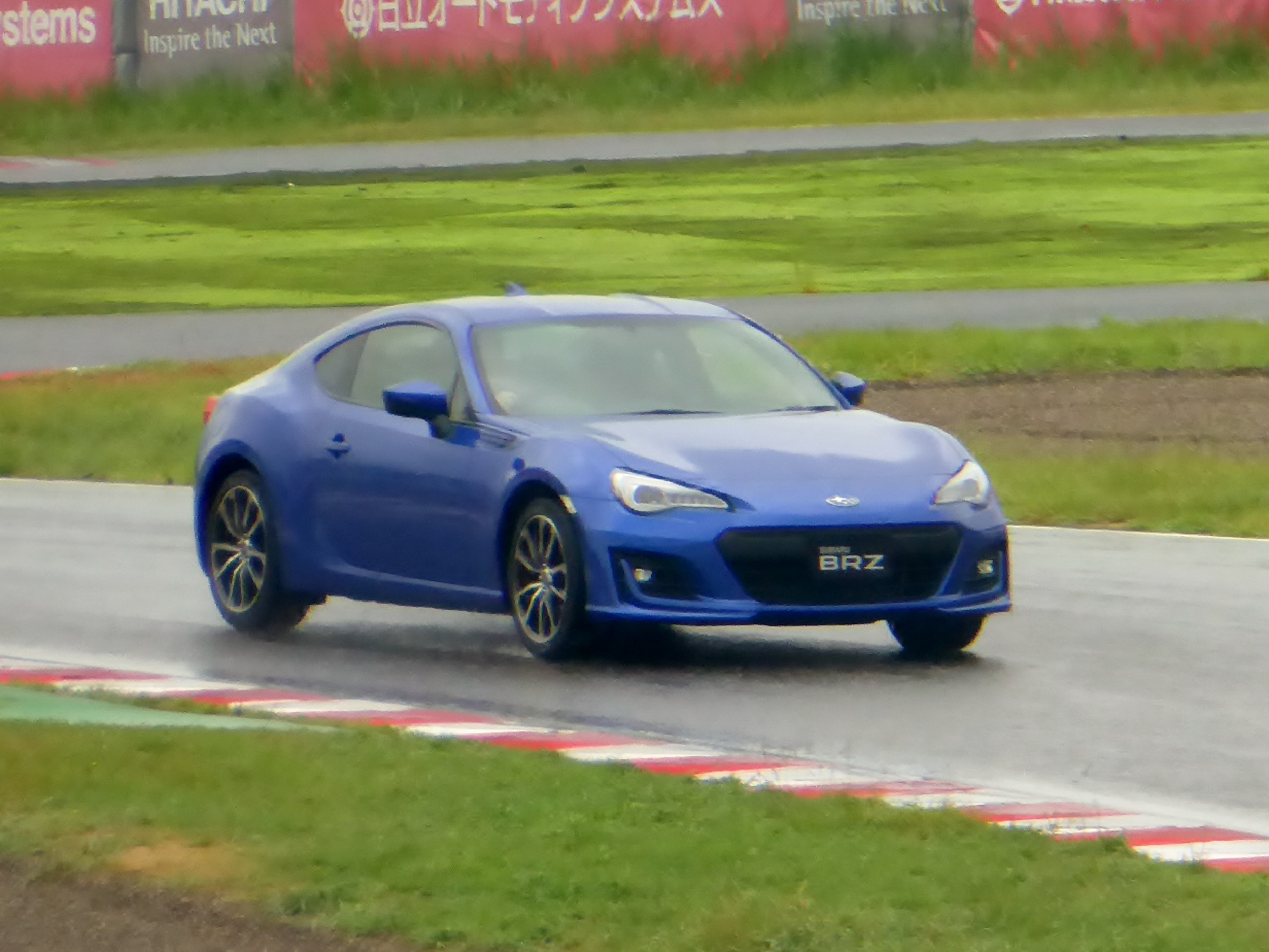 DBA-ZC6型スバル・BRZ Sを撮影。